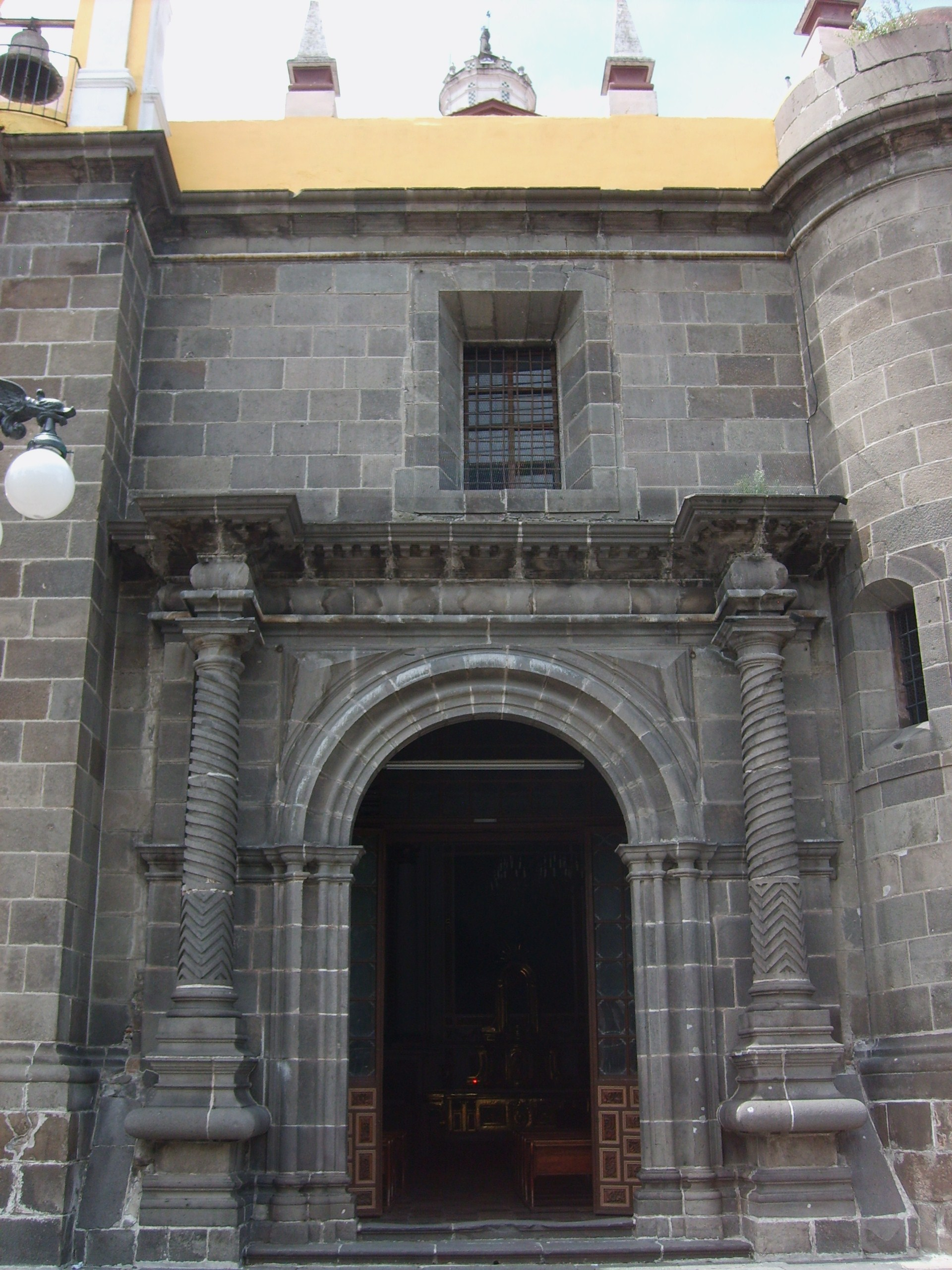 Portada del Sagrario Metropolitano, Catedral de Puebla.